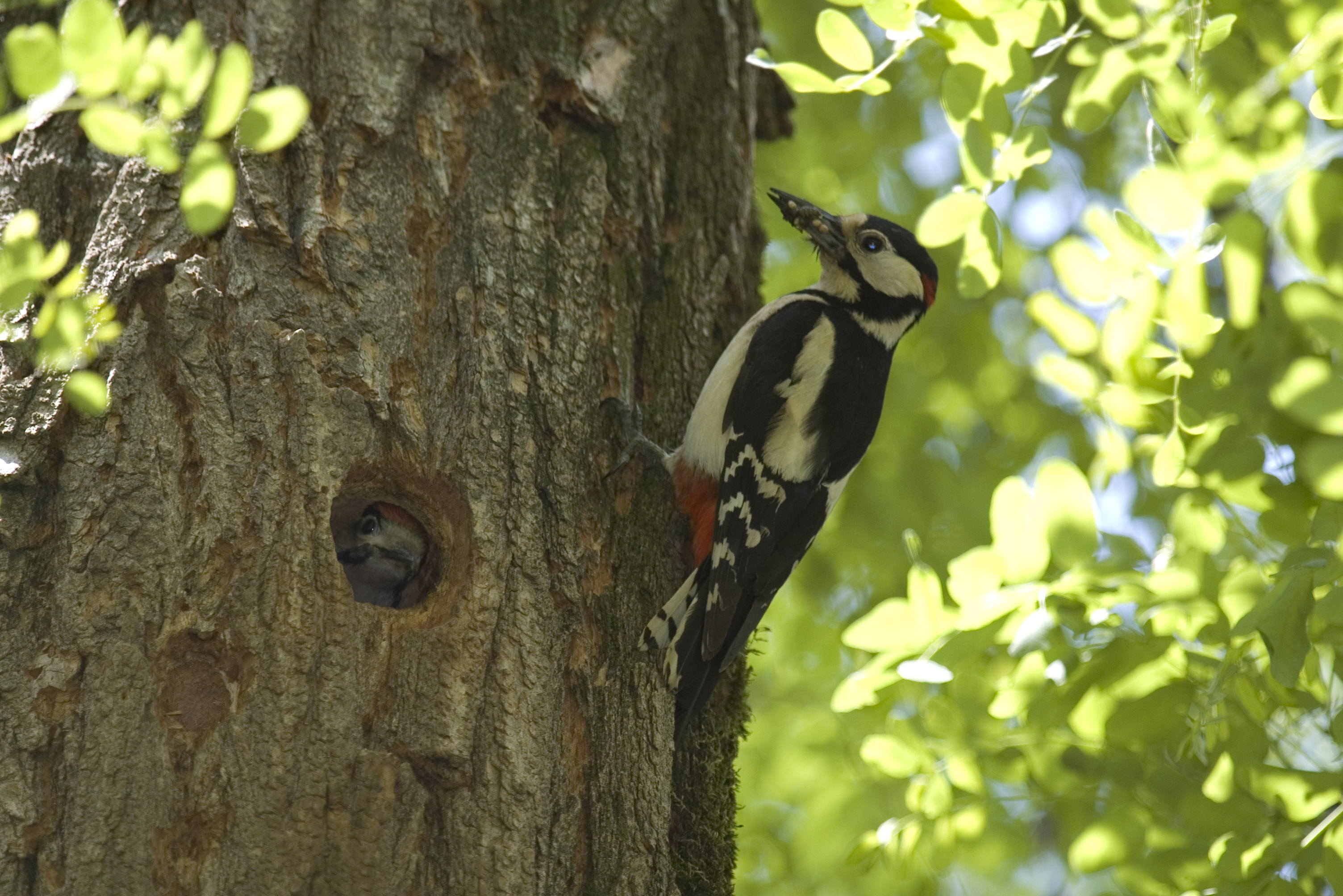 Picchio rosso maggiore (Dendrocopos major) a Legnago